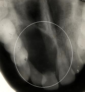 Santral dev hücreli reparatif granülom: Üstçenede, komşu dişlerin köklerini eriten ve iten lezyon